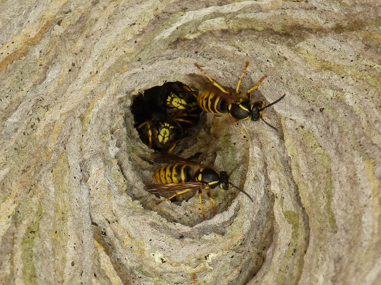 Dolichovespula norvegica?, aufgenommen in Südniedersachsen